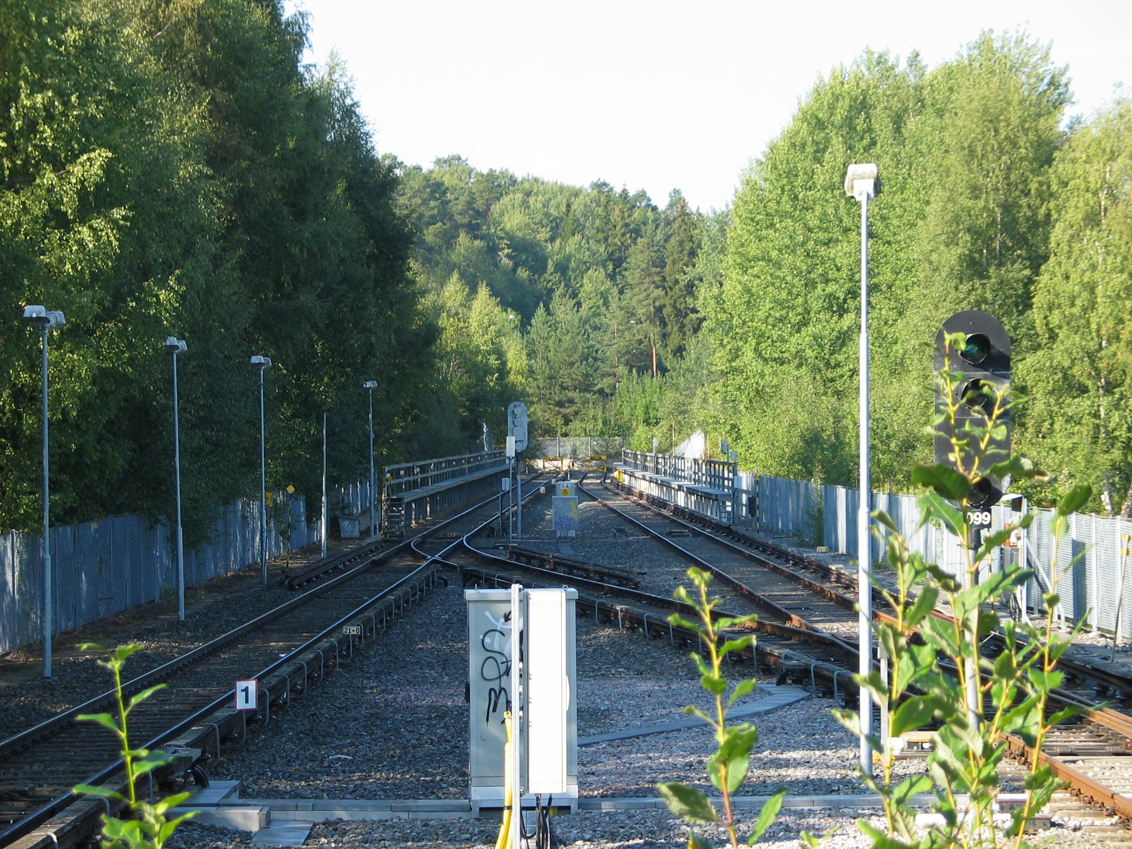 Norsborg, a metro station in Stockholm, Sweden.